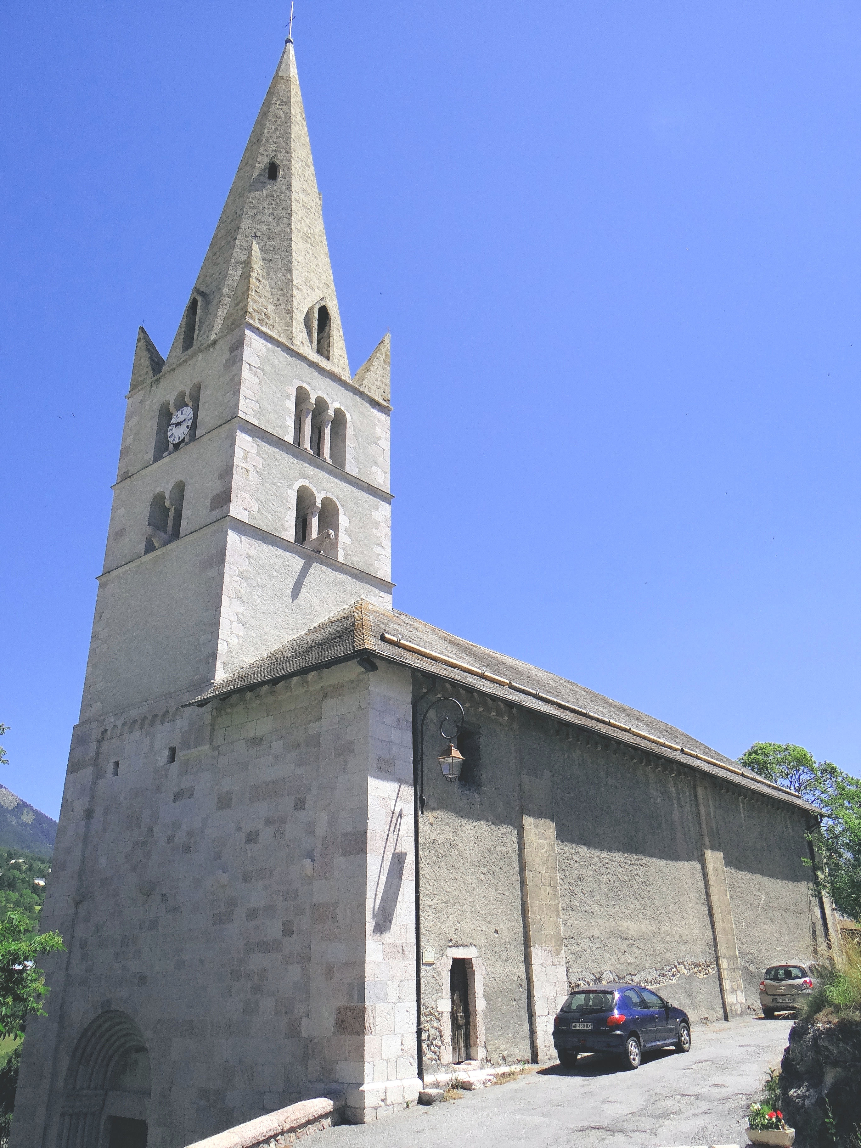 Saint-Crépin - Église Saint-Crépin-et-Saint-Crépinien .